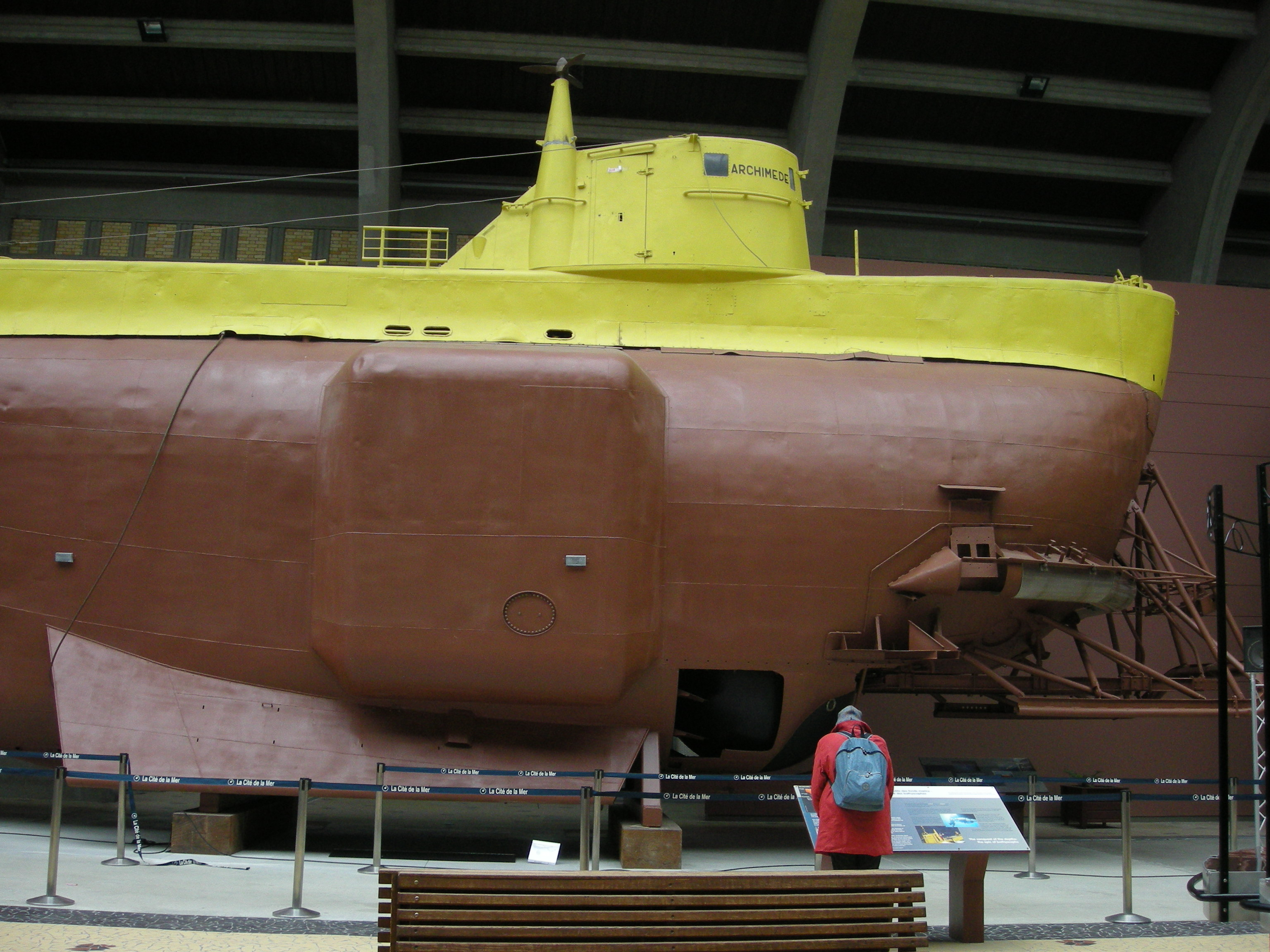 Le bathyscaphe Archimède à la cité de la Mer de Cherbourg, Normandie